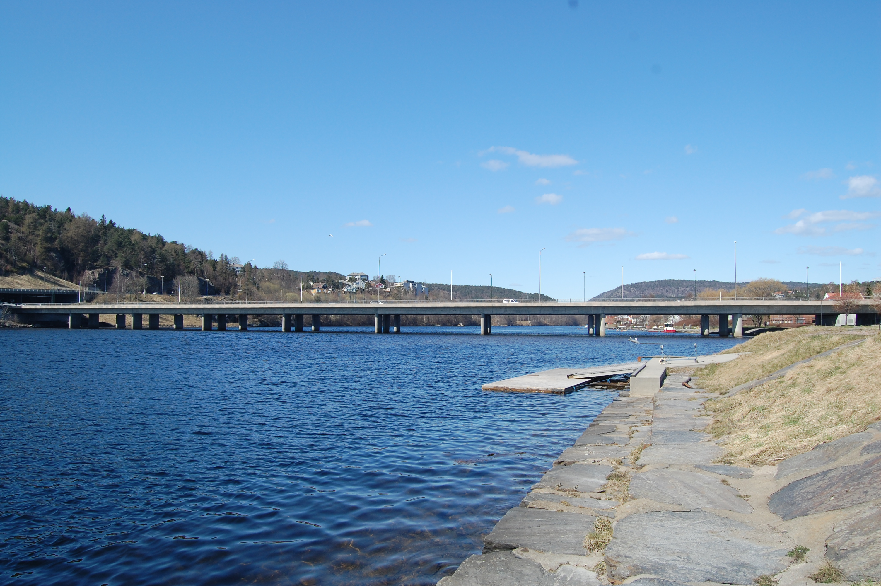 Oddernesbrua, Kristiansand